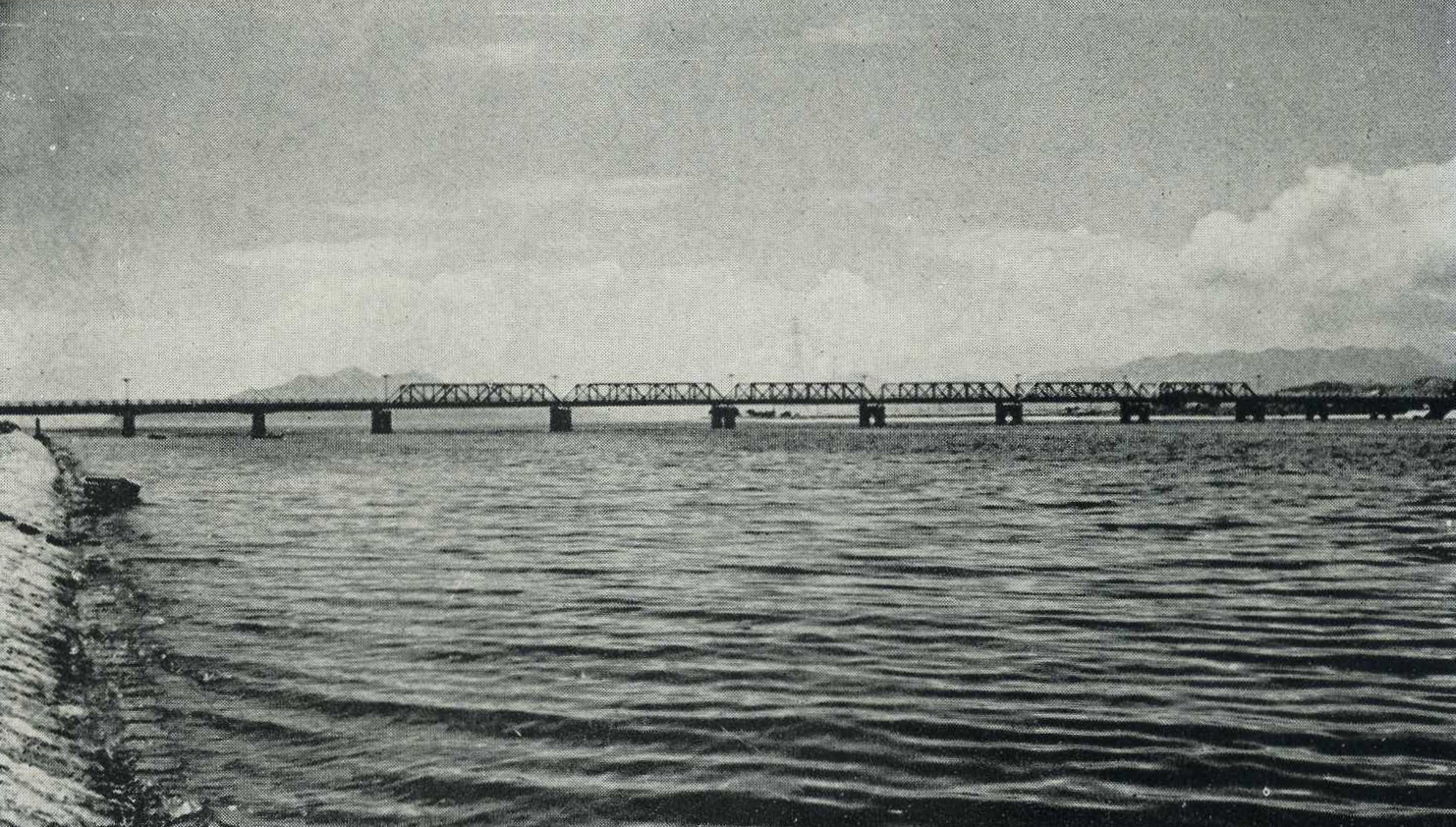 1950年代の庚午橋。後に架け替えられる。